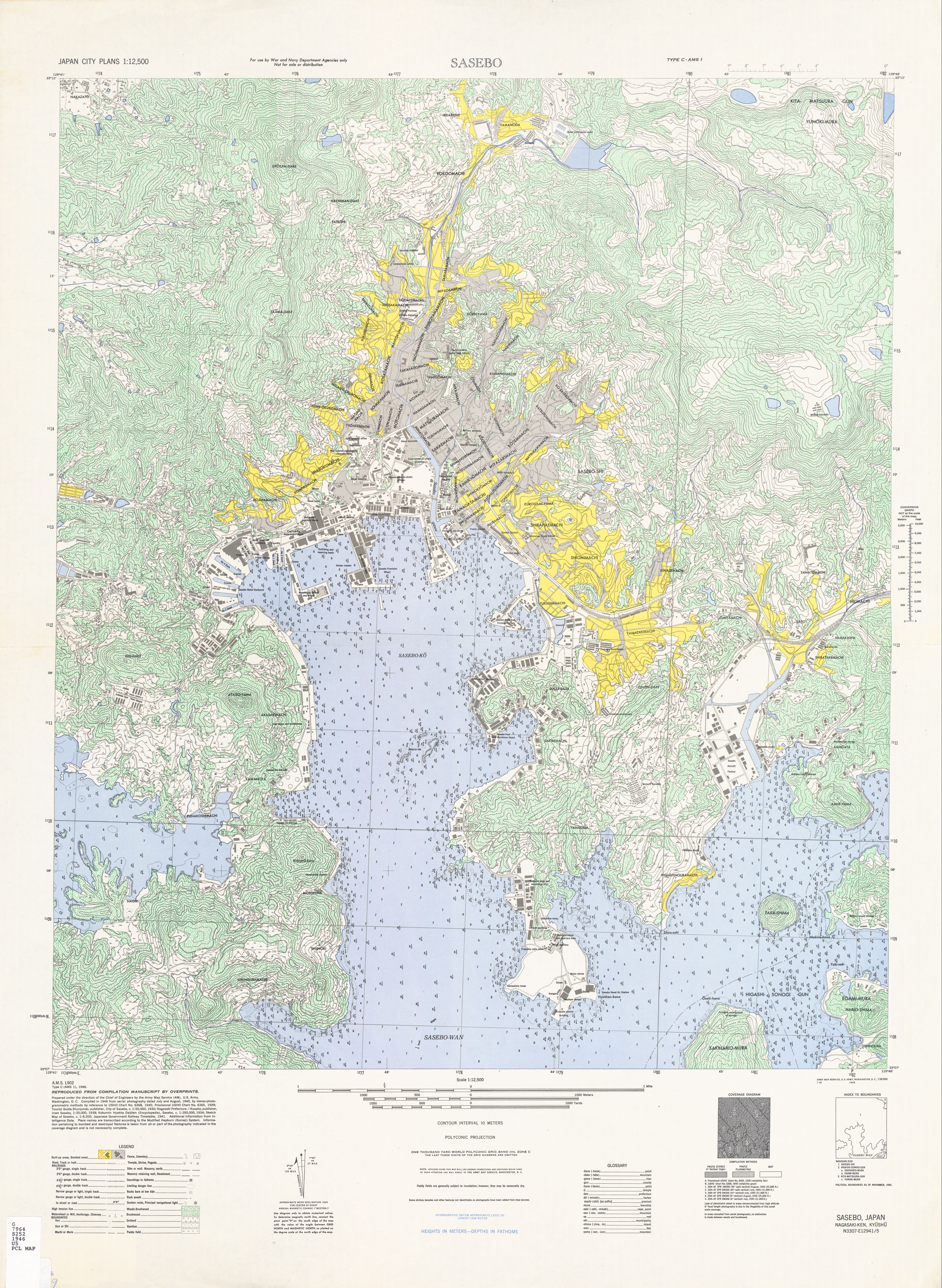 1946年米軍作成の佐世保市中心部及び佐世保港要部の地図。